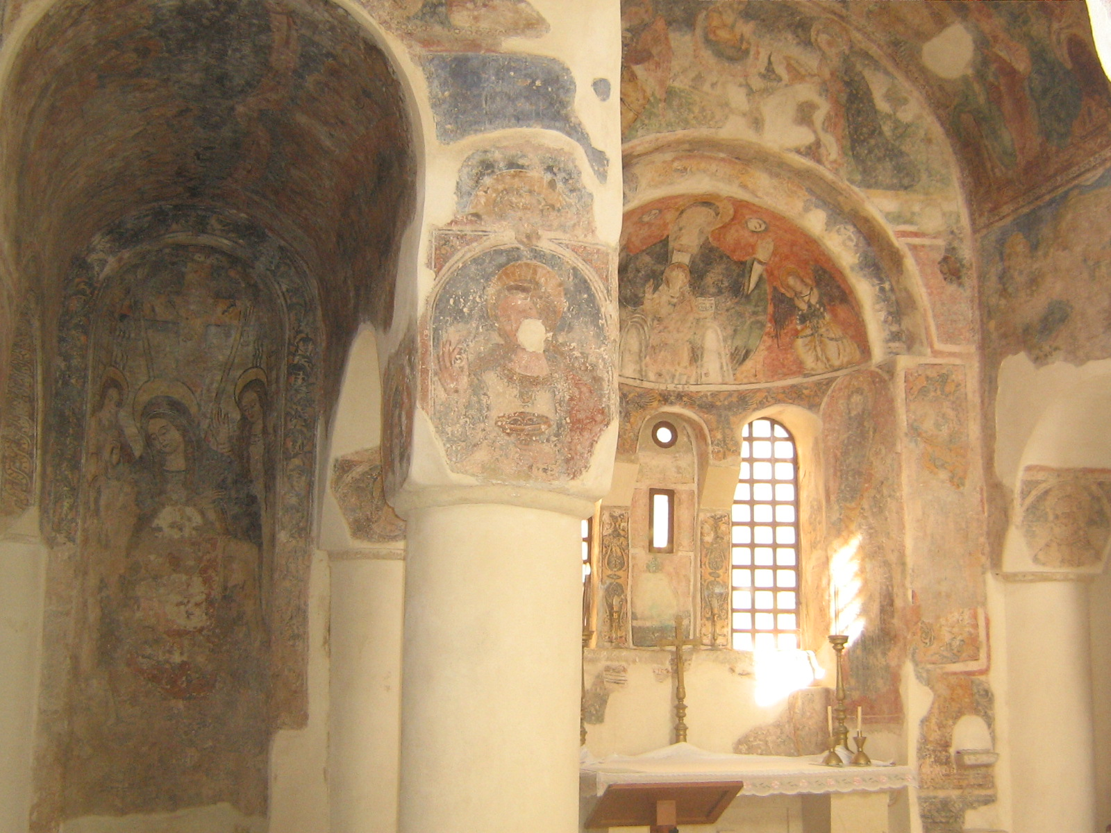 Otranto - Interno Chiesa di San Pietro